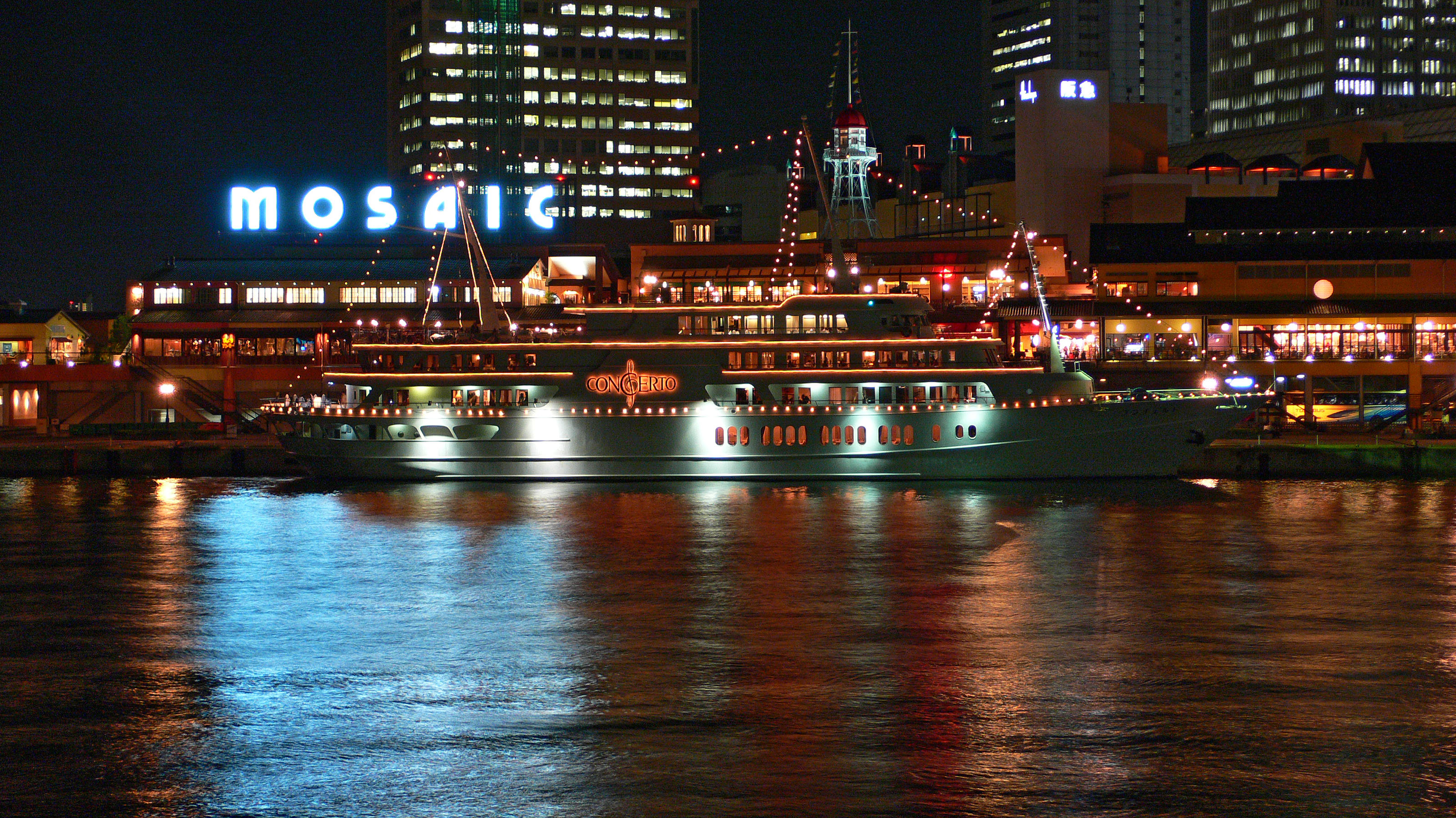 Harborland "Takahama-ganpeki" of the Kobe harbor ( Kobe, Hyogo, Japan)